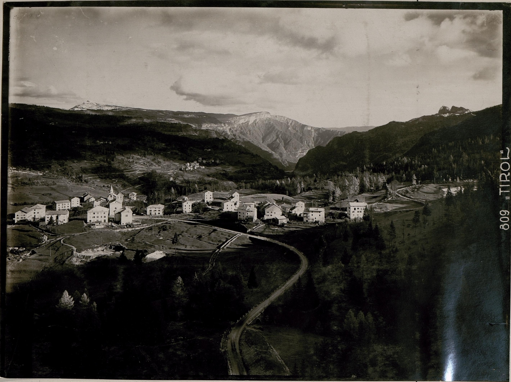 Nordhang Cornetto (Hornberg) Monte Verena, Campolongo Carbonare (Kohlingen) und Tonezzaspitzen.